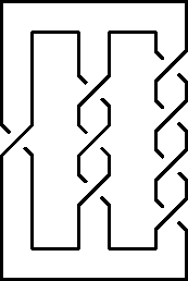 結び目8_4の２重性並行表示